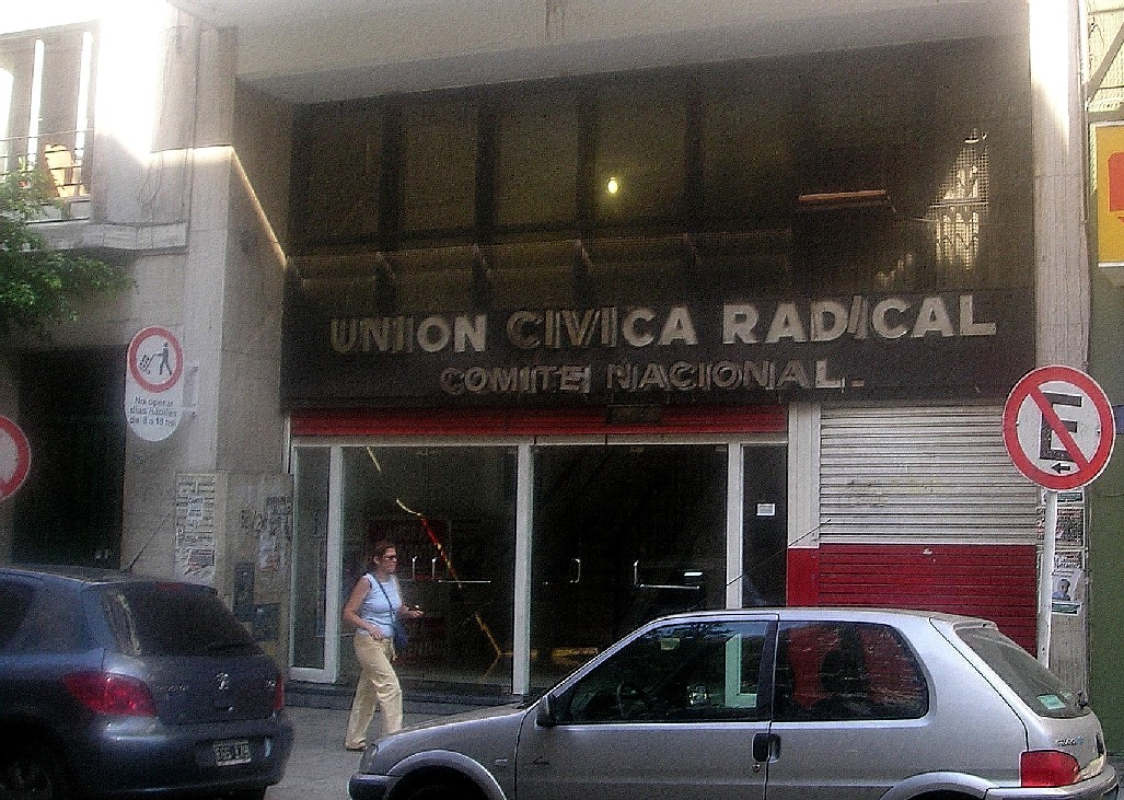 Unión Cívica Radical. Sede del Comité Nacional. Buenos Aires, Argentina. Fecha: 11/04/2006. Autor: Pepe Robles. Subida por el autor.